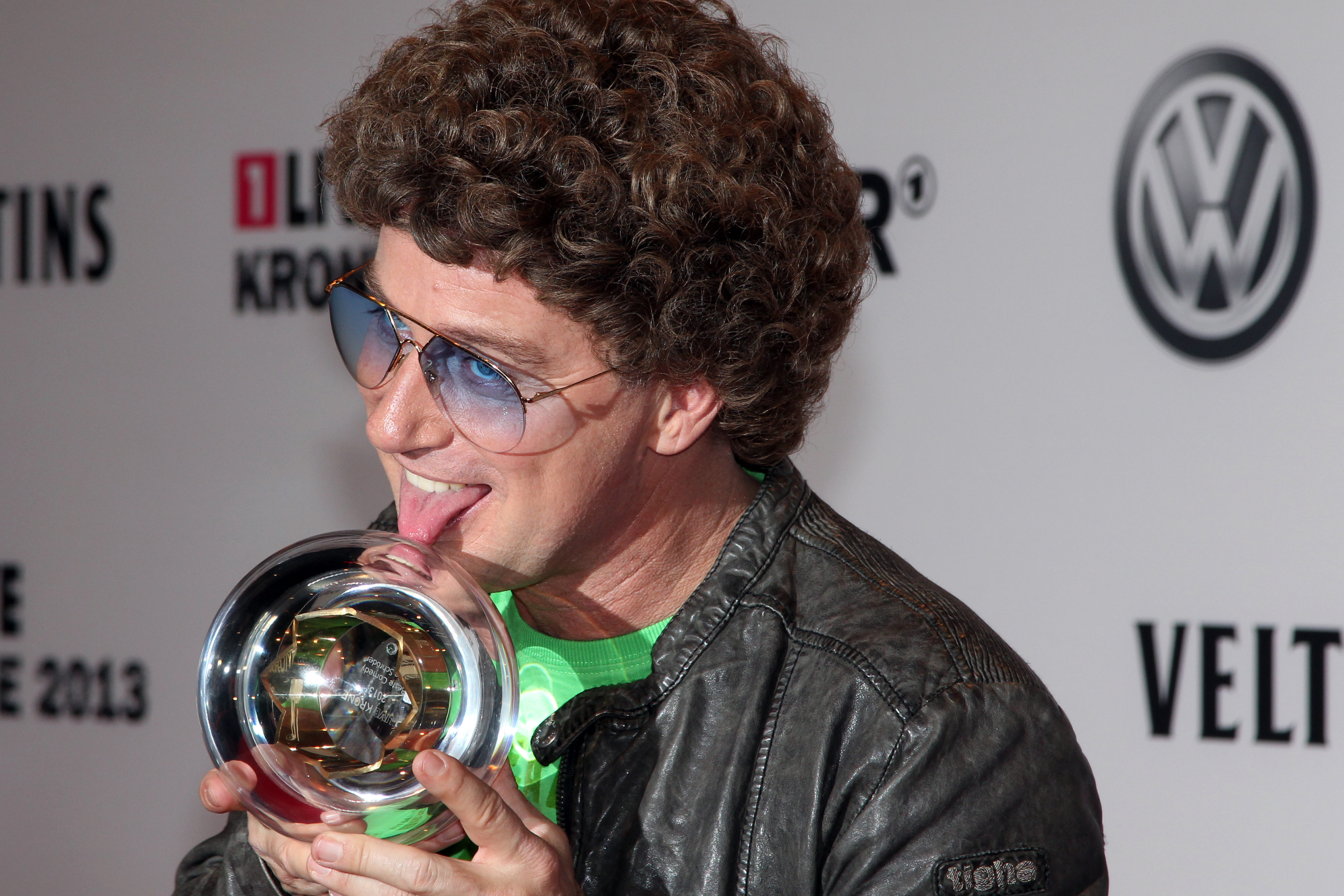 1 LIVE Krone 2013 Preisträger Atze Schröder